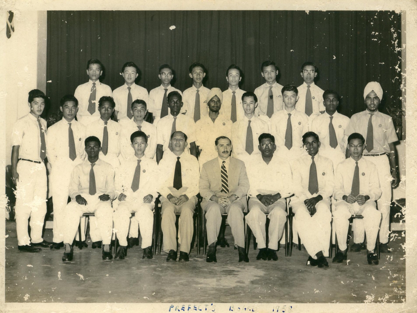 Pengawas Sekolah, 1958, Maxwell School